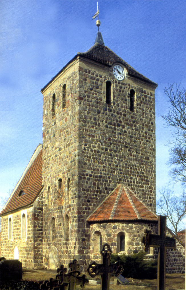 Dorfkirche Grünow bei Angermünde. Die Dorfkirche von Grünow ist die einzige heute noch bestehende Chorturmkirche östlich der Elbe. Dieser Grundrisstyp, bei dem der Turm nicht wie sonst üblich an der Westseite steht, ist in Süddeutschland relativ verbreitet, in Nordostdeutschland jedoch völlig ungewöhnlich. Wegen der „verkehrten“ Stellung des Turms (über dem eingezogenen Chor) wurde Grünow daher früher "Verkehrt-Grünow" genannt. Object location53° 07′ 23.13″ N, 14° 04′ 10.47″ E